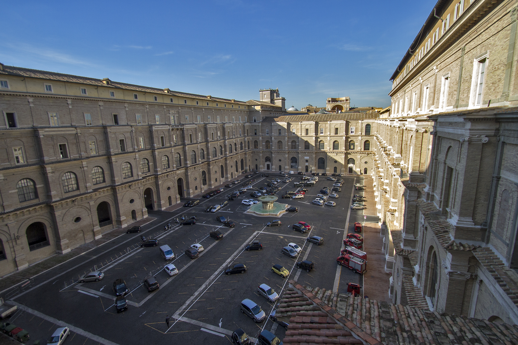 Vatican 5828